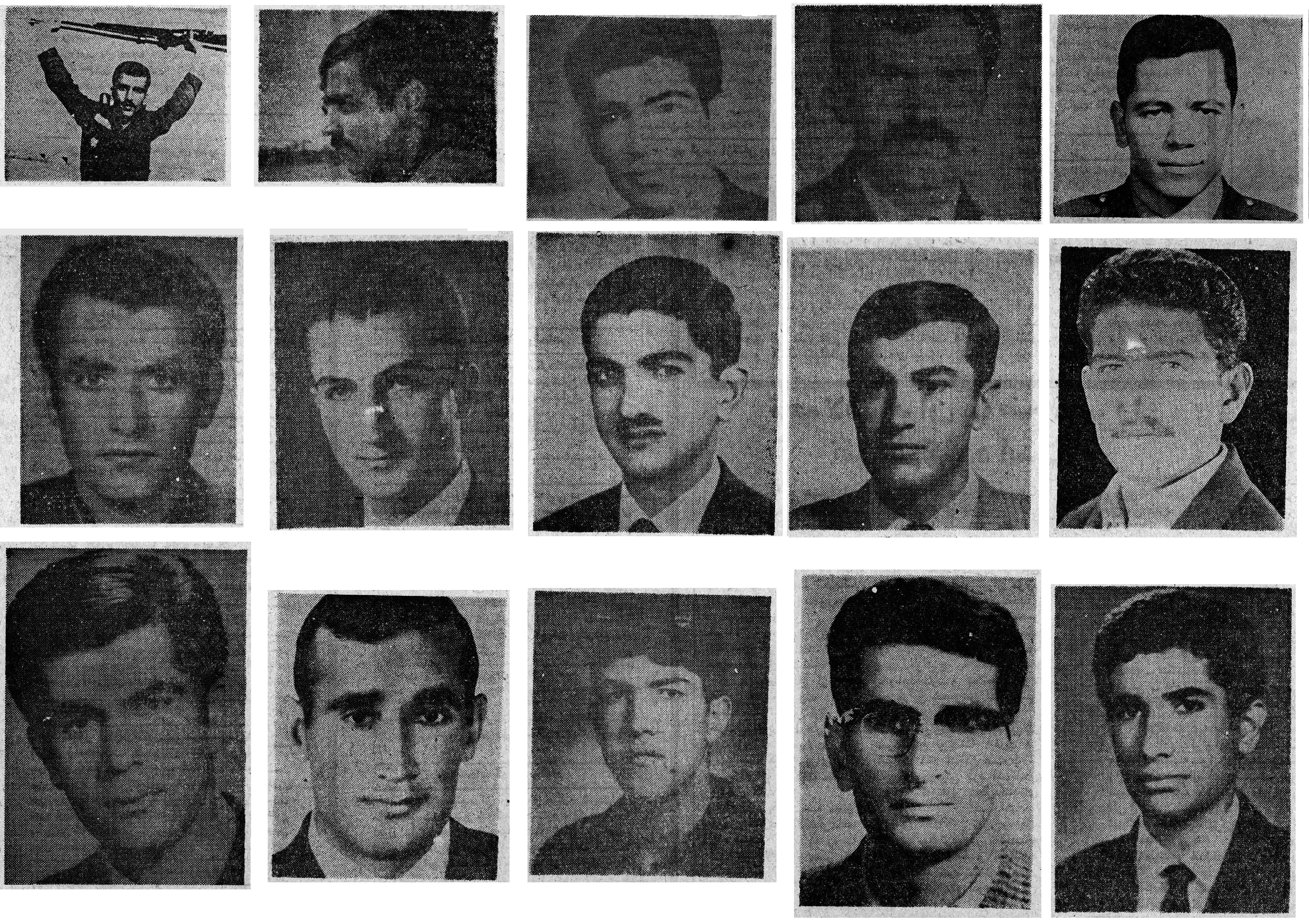 تصویر چریک‌های جنبش سیاهکل. از راست به چپ: ردیف اول: محمدعلی محدث قندچی، هوشنگ نیری، محمدمهدی اسحاقی،‌ جلیل انفرادی، احمد فرهودیردیف دوم: علی‌اکبر صفائی فراهانی، اسماعیل معینی عراقی، محمدهادی فضلی، شاء‌الله مشیدی، هادی بنده‌خدا لنگرودیردیف سوم: محمد رحیم سمائی، غفور حسن‌پور اصیل، ناصر سیف دلیل فراهانی، عباس دانش بهزادی، اسکندر رحیمی